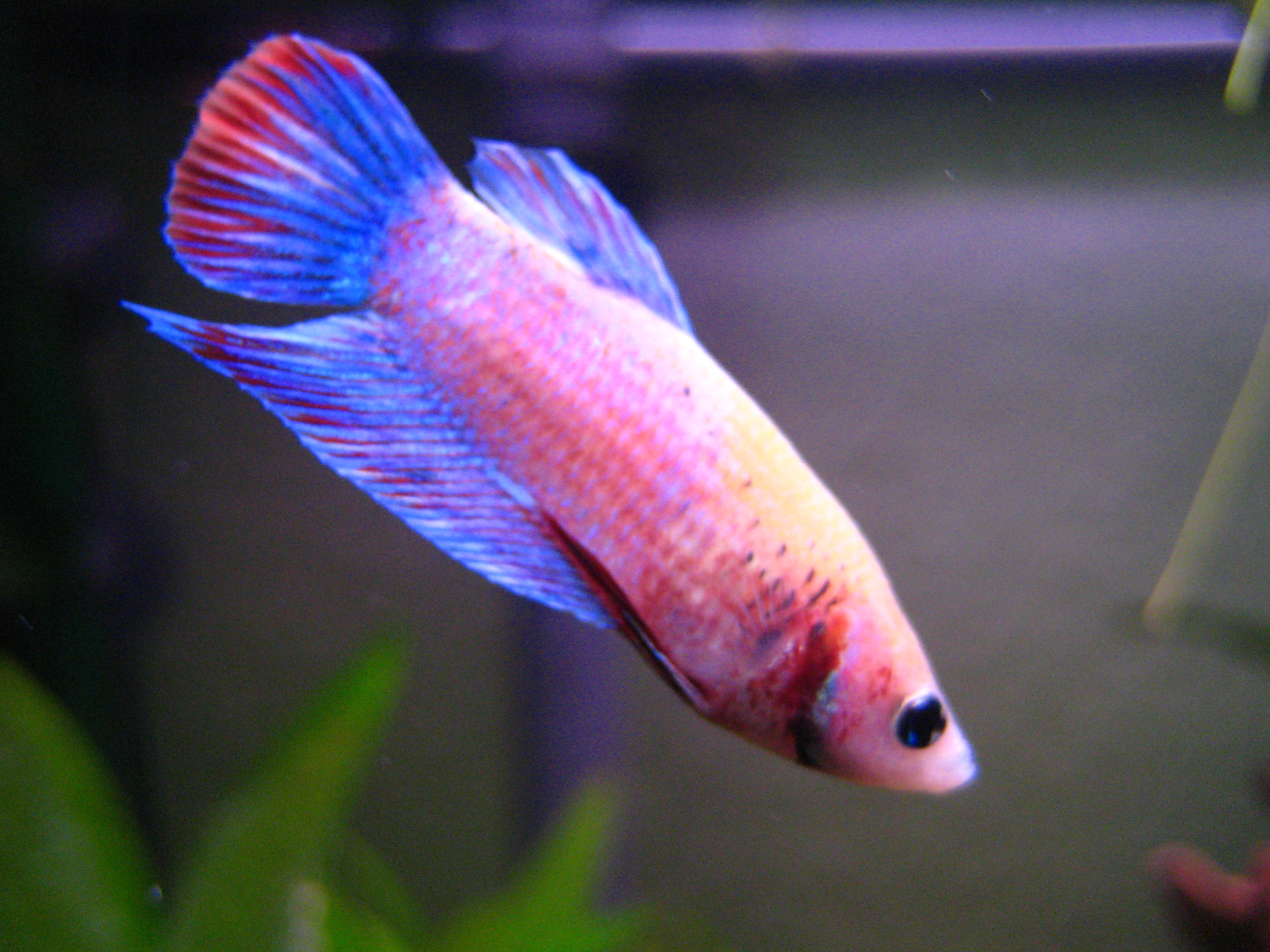 Kampffischweibchen (betta splendens) türkis/pink